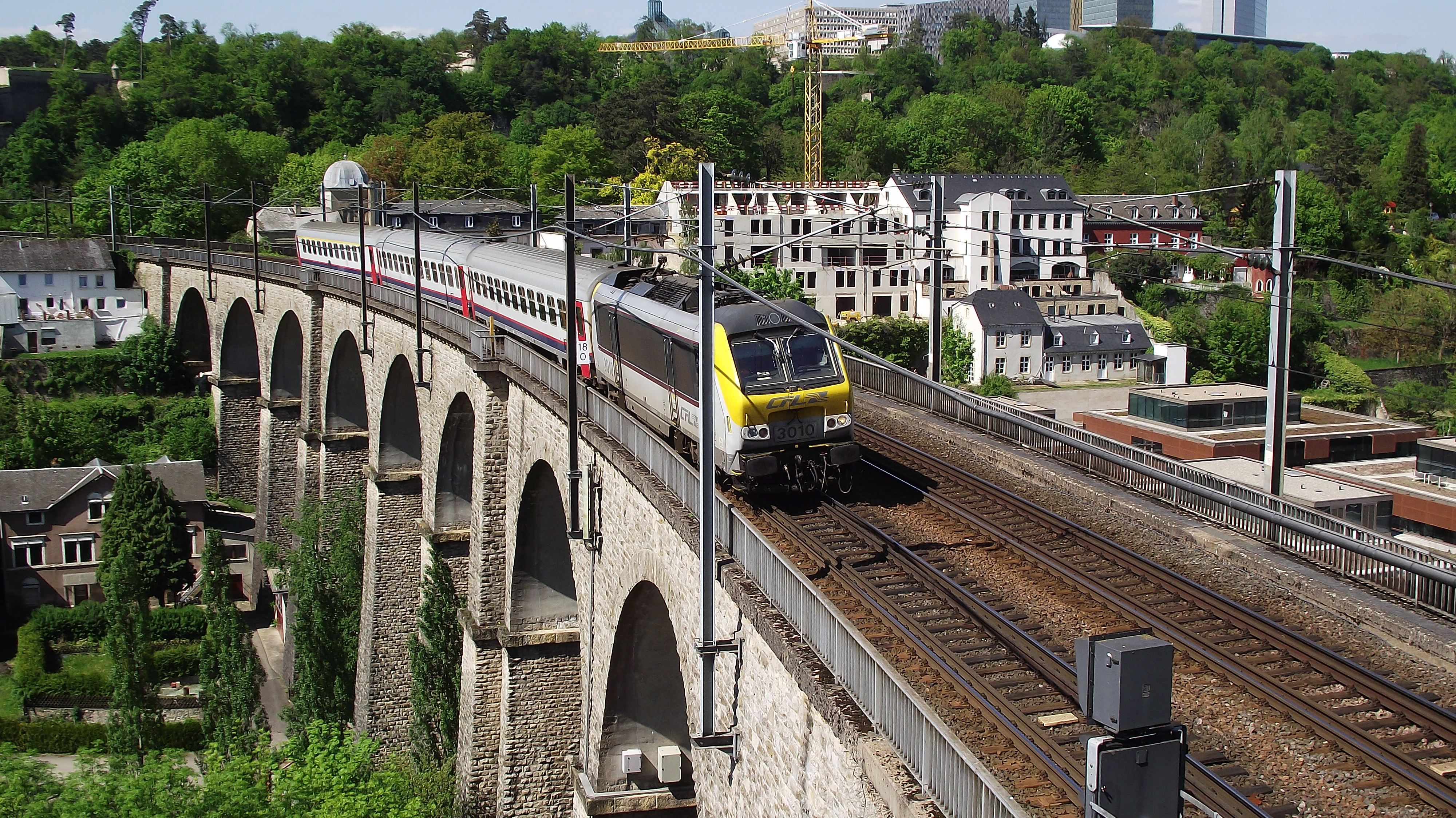 IR Luik Luxemburg op viaduct